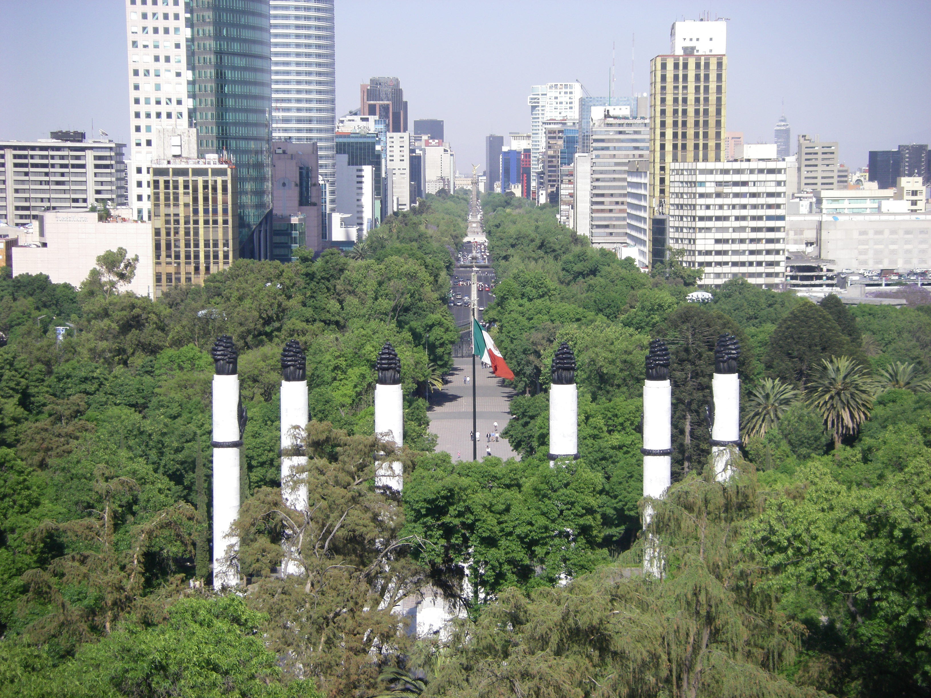 Blick auf Mexiko-Stadt